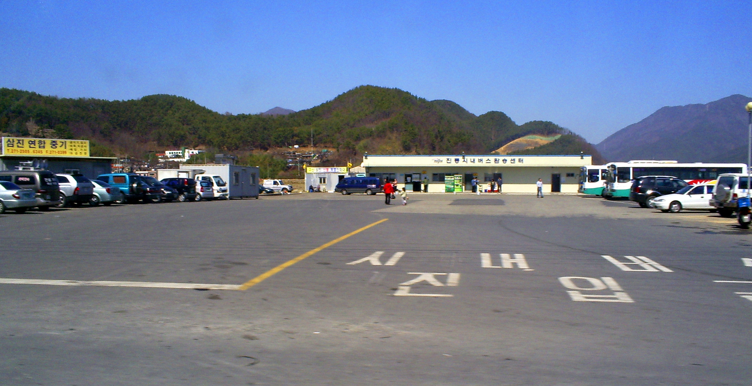 마창진 광역권의 시내버스 진동버스환승센터 전경 직접 촬영 2009년 ko:3월 15일 촬영 촬영 장소 : 경상남도 마산시 진동면 진동삼거리 부근